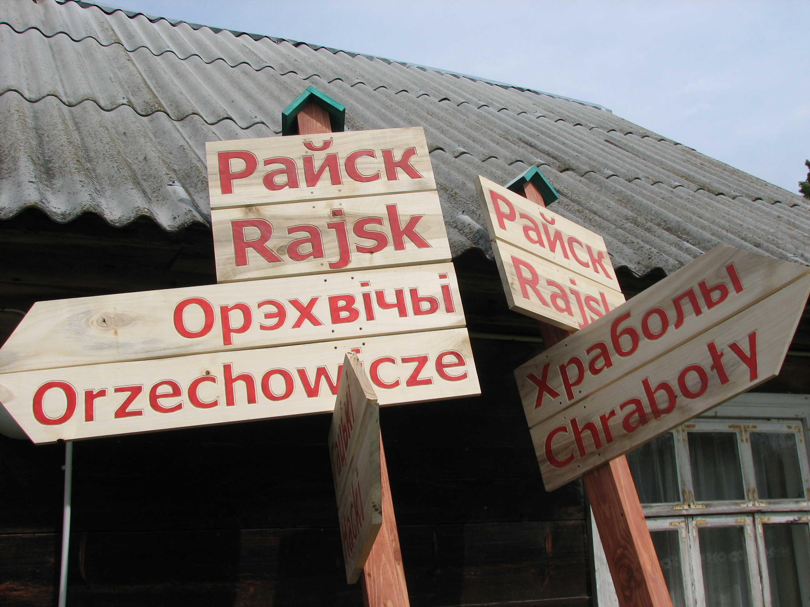 Беларуская (тарашкевіца): Турыстычныя знакі на мове беларусаў Падляшша і польскай мове